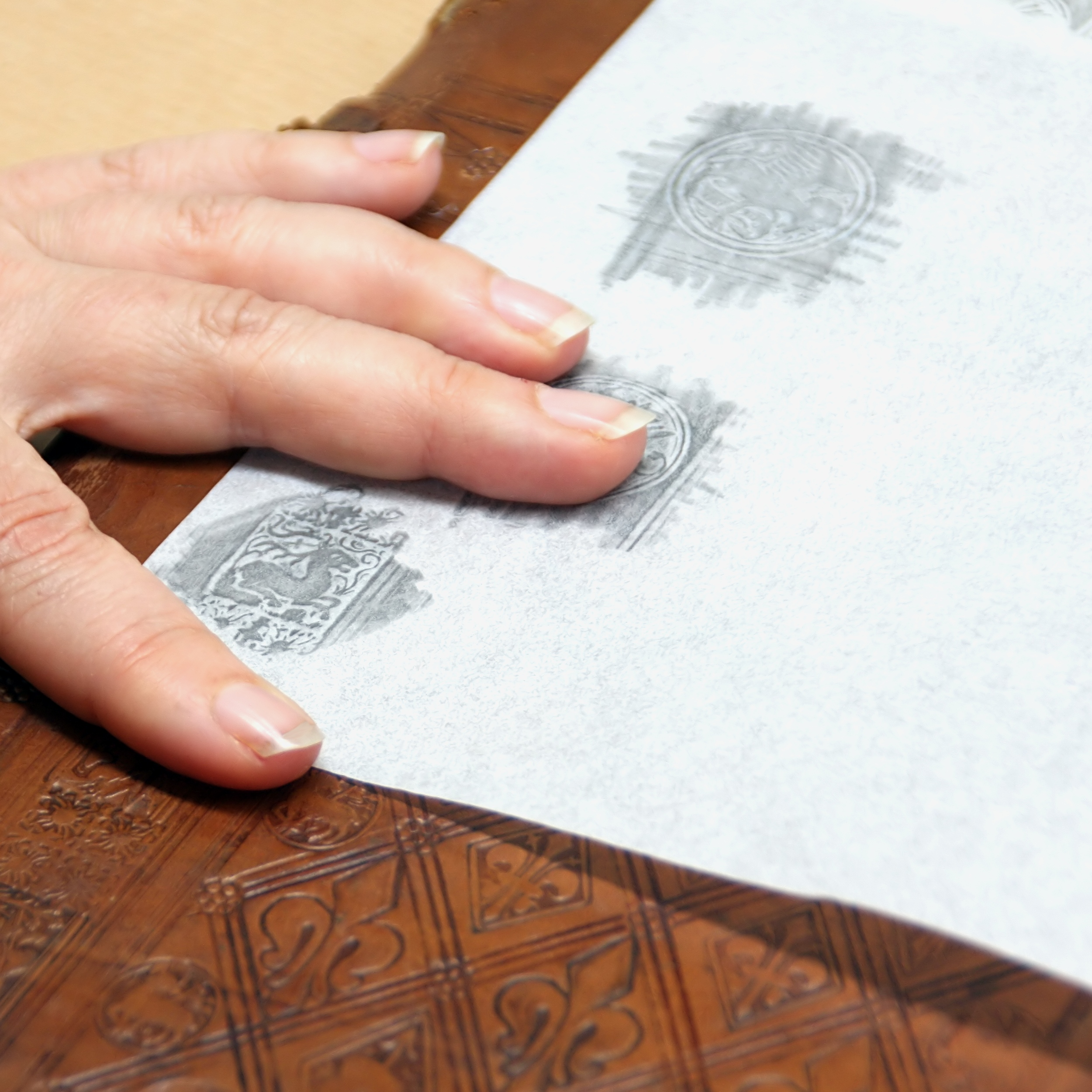 Durchreibung eines Stempels von einem alten Bucheinband. Das Foto entstand während einer Führung durch die Bibliothek des Kölnischen Stadtmuseums